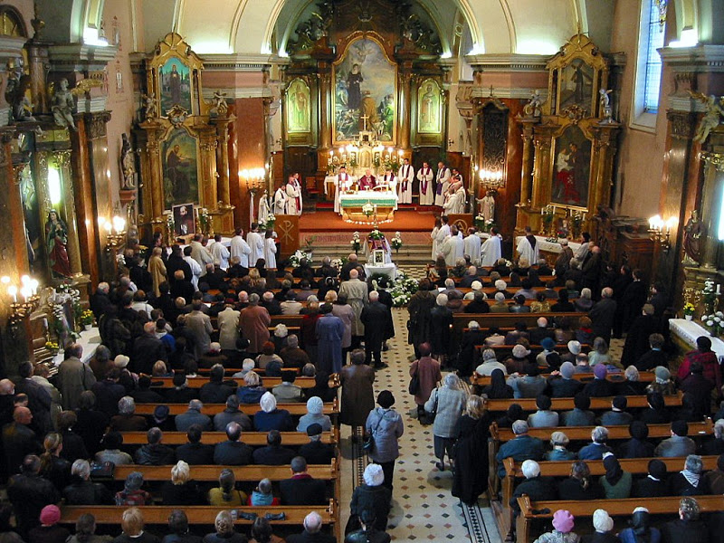 Budai kapucinus templom, 2003. Pacsai Fidél atya gyászmiséje